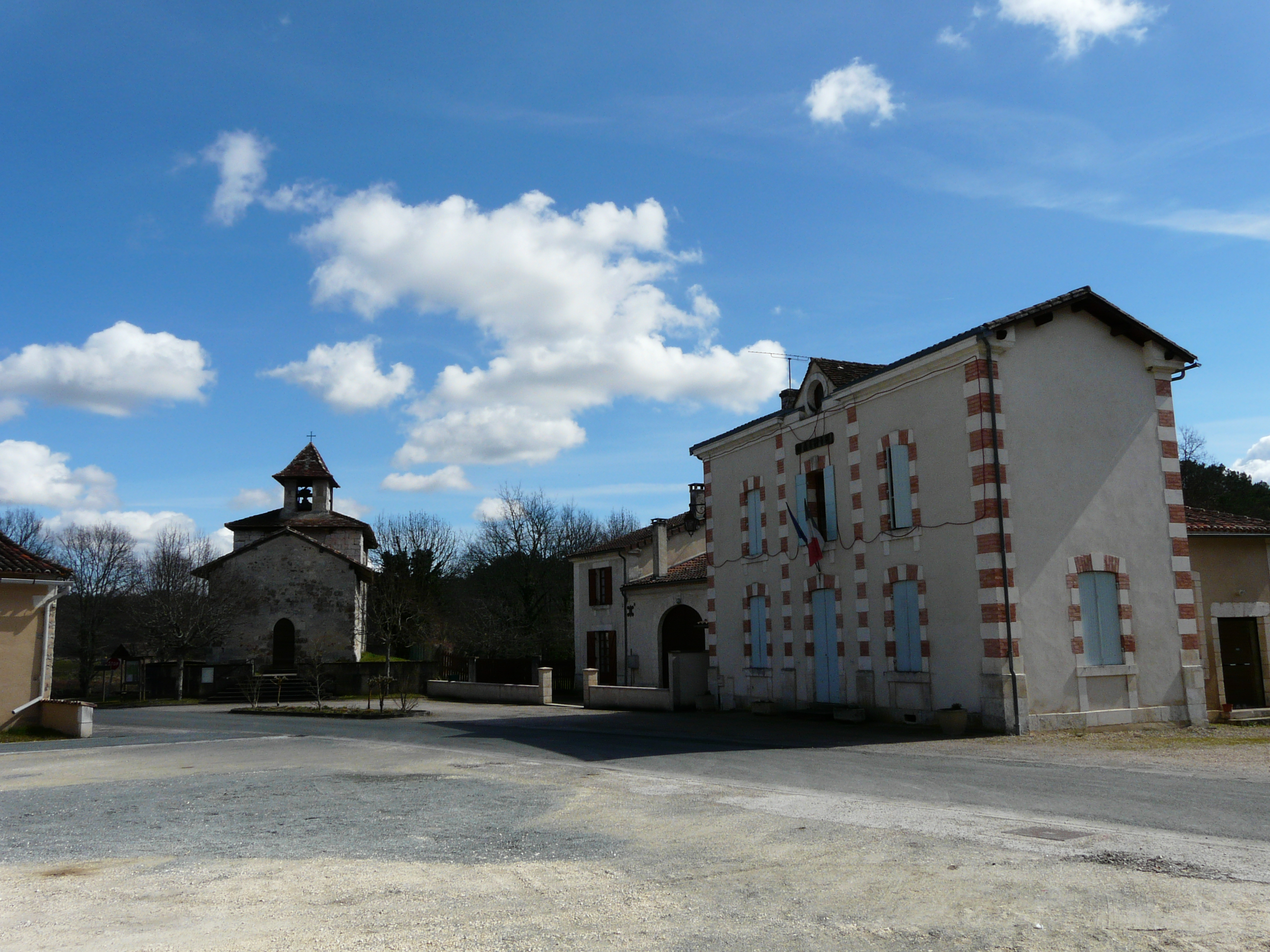 Le hameau de Saint-Jean-d'Ataux, Dordogne, France.